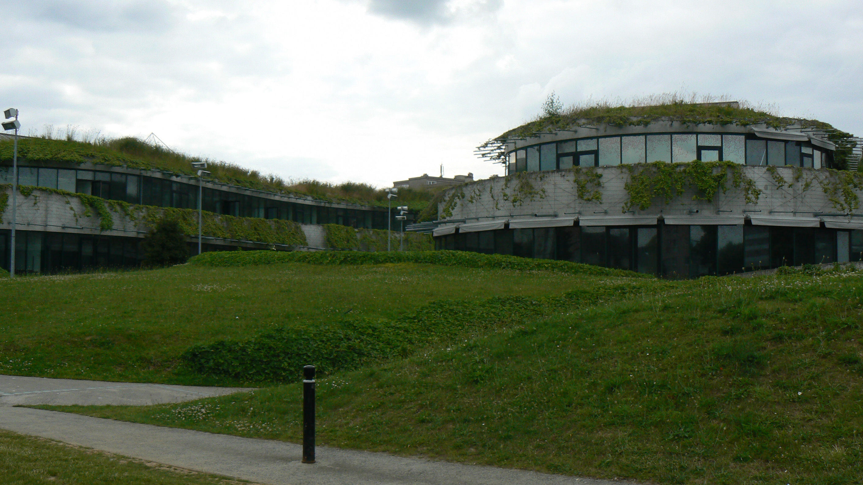 Bâtiments de la DDTEFP et de la DREFP situés à Hérouville St Clair